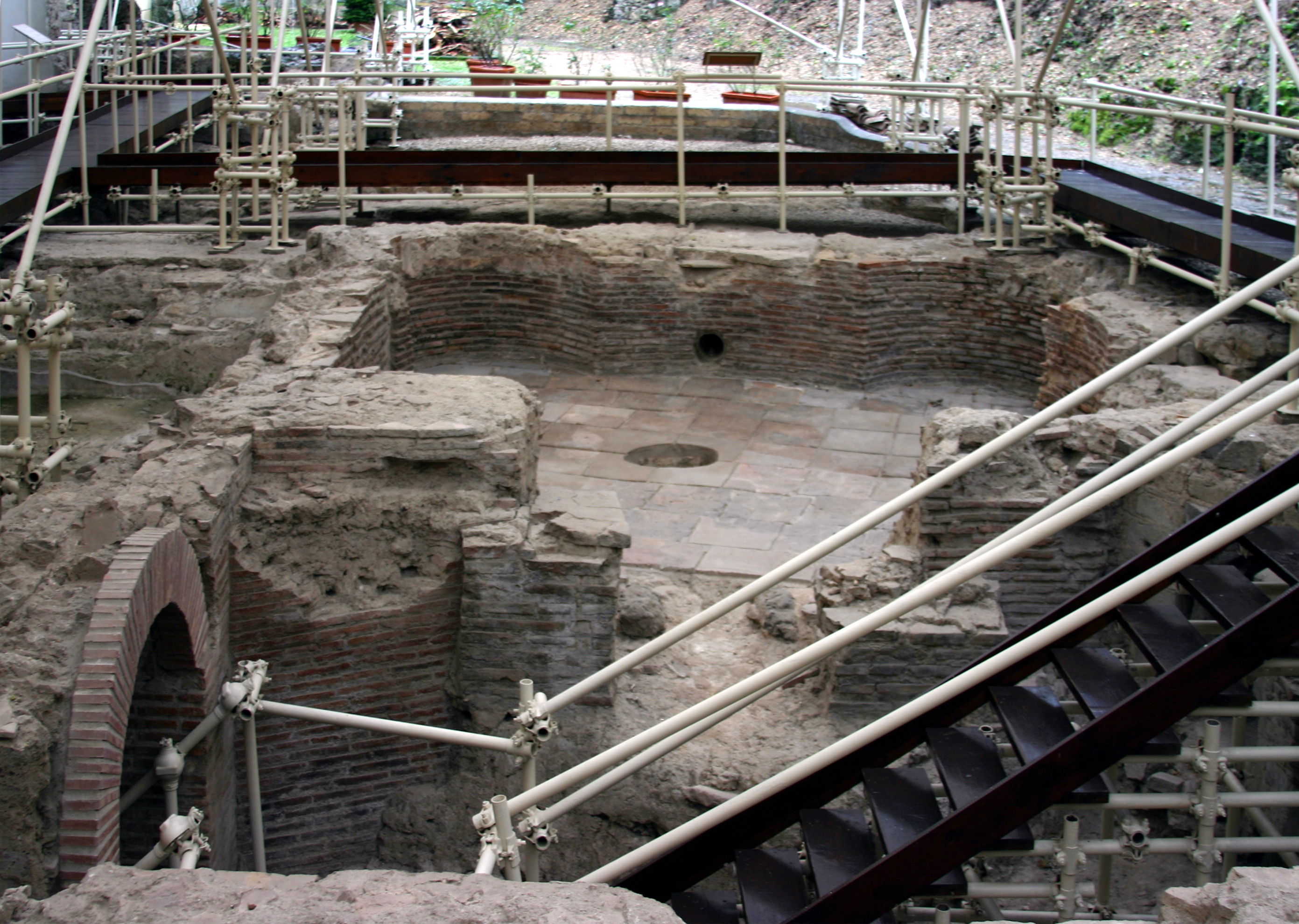 Santa Chiara - Naples